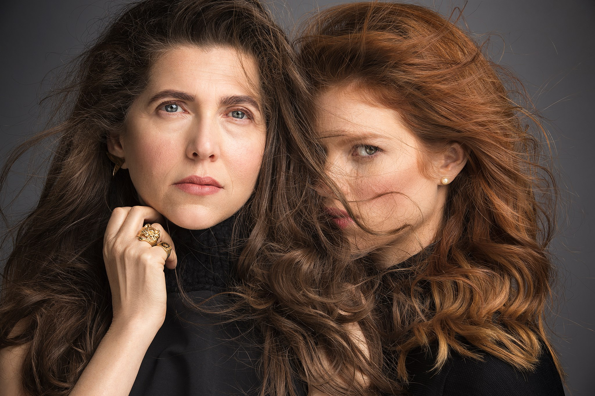 קרן מור ויובל שרף בהצגה: רילוקיישן בבימויה של מור פרנק